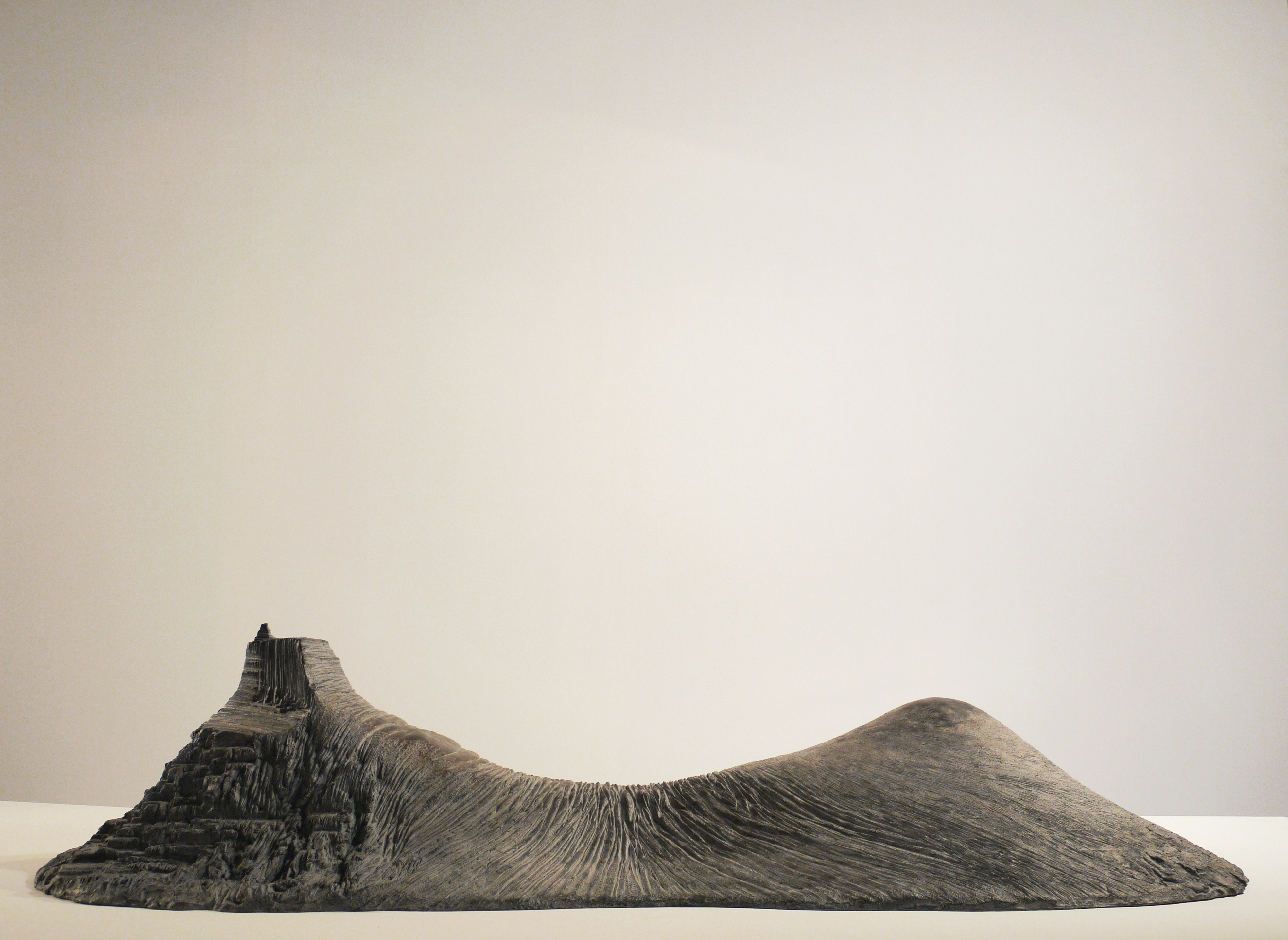 Pensée du paysage, La femme étendue 2, 1998, polyester, 35 x 164 x 68 cm